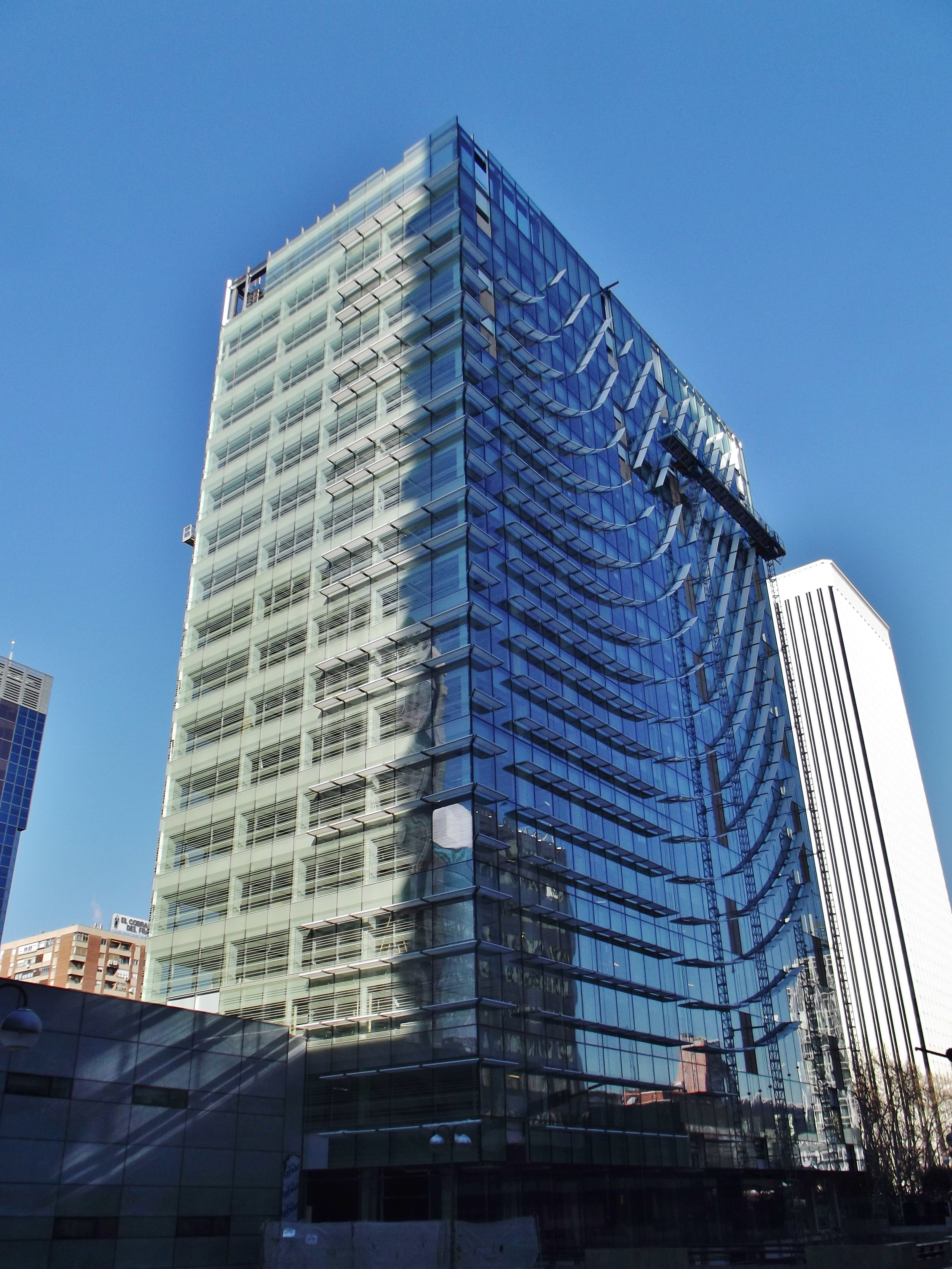 Edificio Ederra, Madrid.